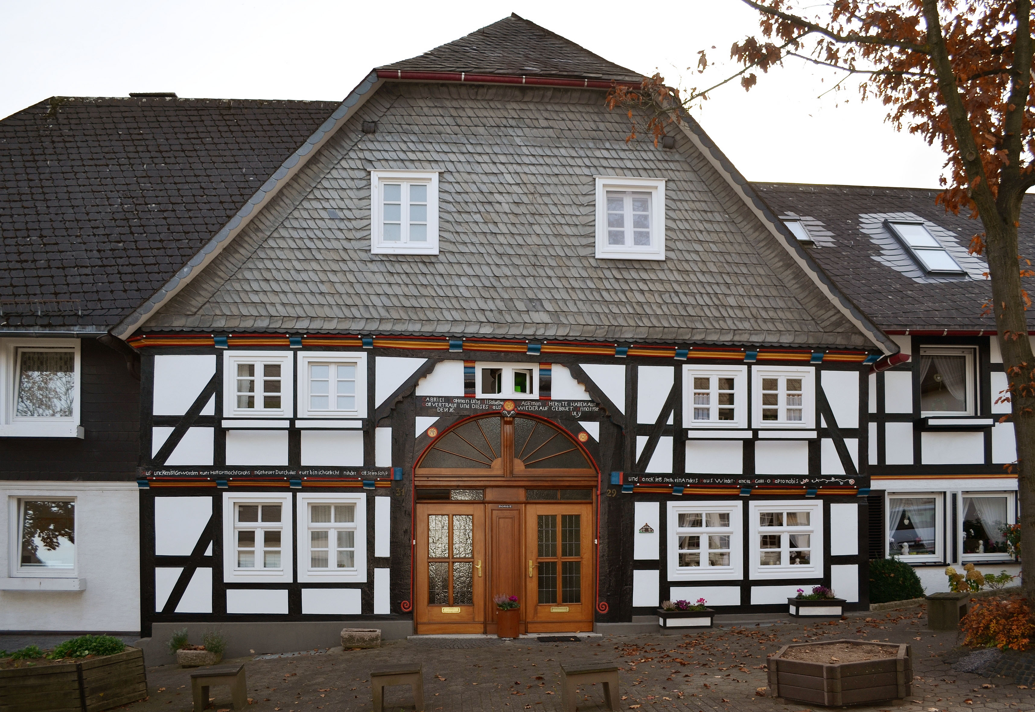 Brilon, Niedere Straße 31 This image shows a heritage building in Germany, located in the North Rhine-Westphalian city Brilon.